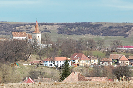 Thalheim in Siebenbürgen.